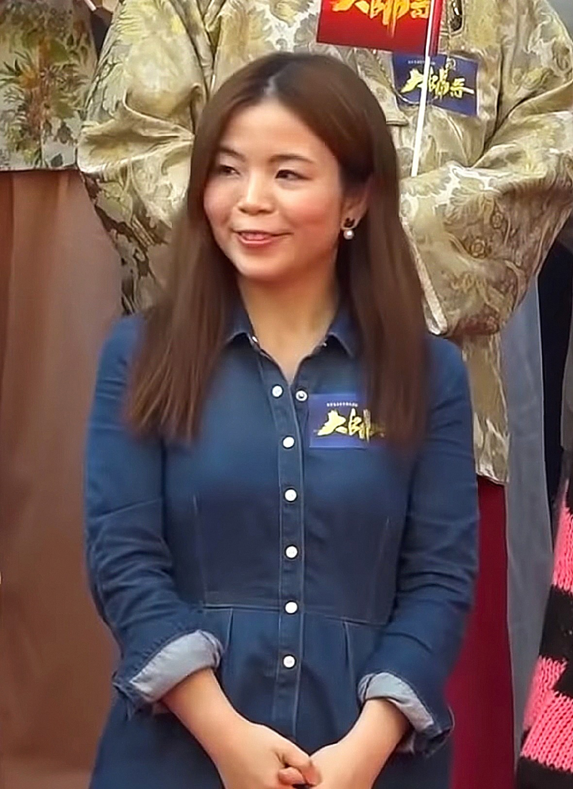 中文（香港）: 《大帥哥》「帥氣登場」活動